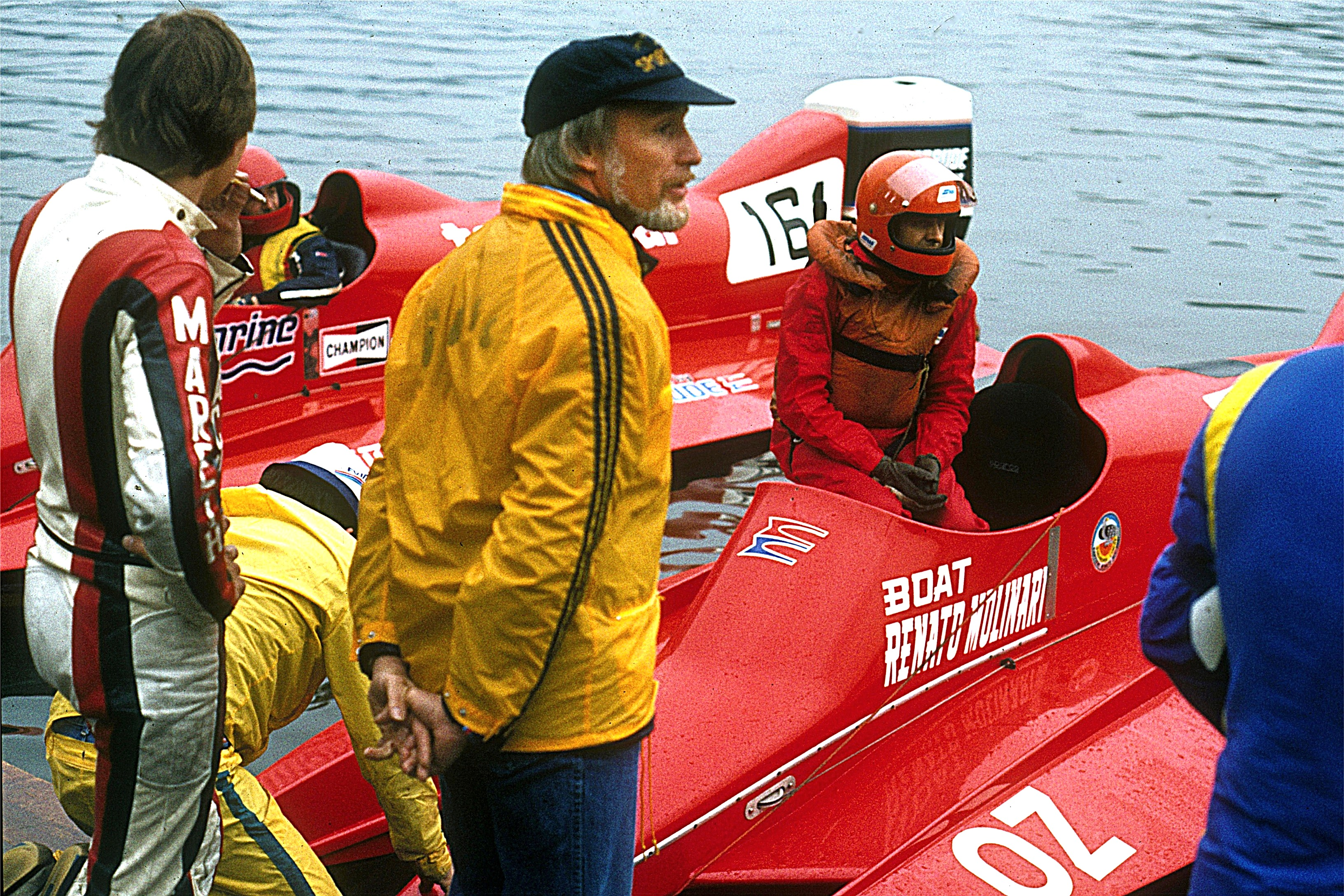 Rainer Bisterfeld (in gelber Jacke), deutscher Motorbootrennfahrer vor einem roten Renato-Molinari Katamaran.